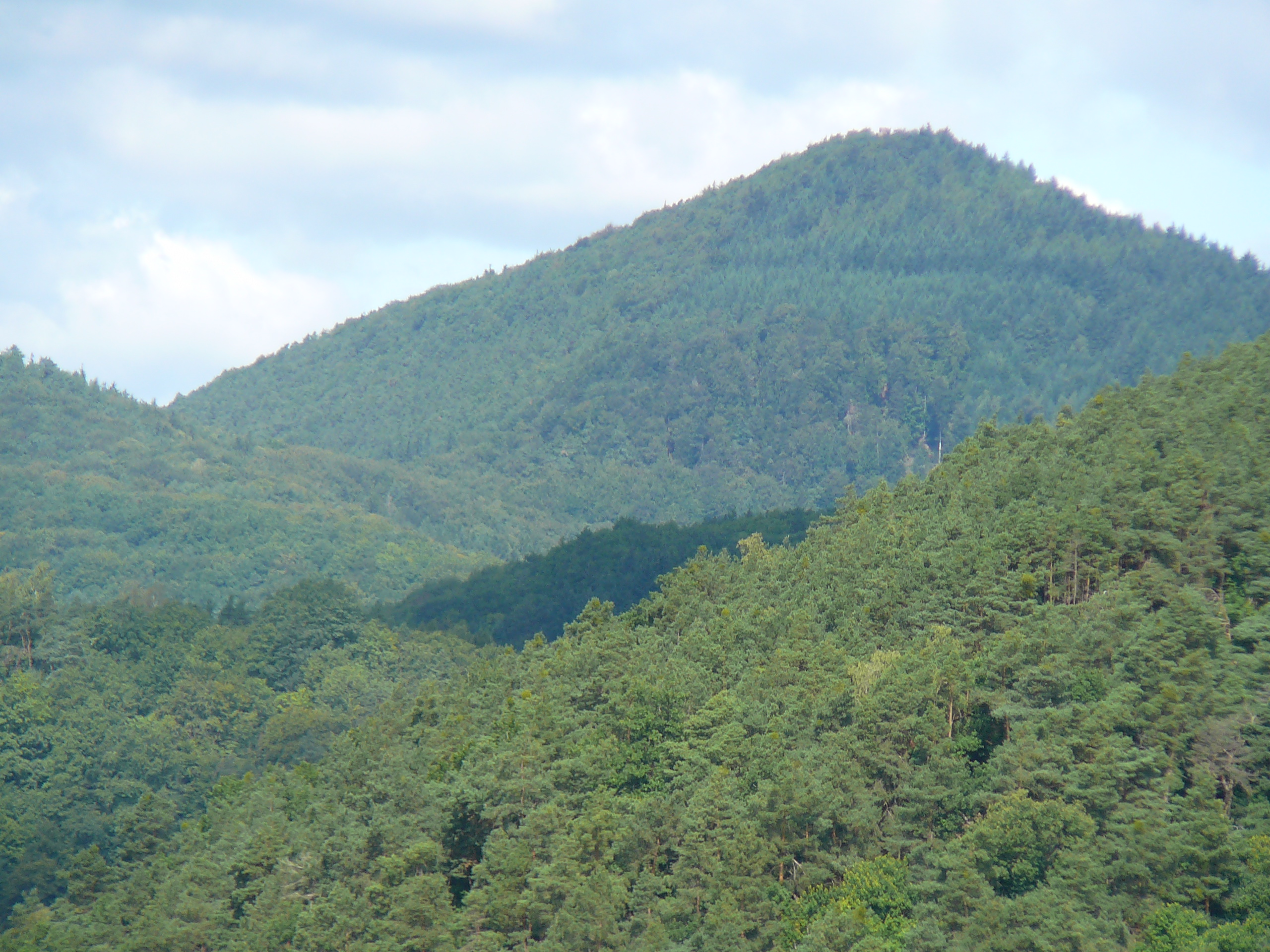 Der Rehberg als prägnante Bergform mit vergleichsweise großer Dominanz und Schartenhöhe: Blick aus der Rheinebene bei Klingenmünster nach Westen